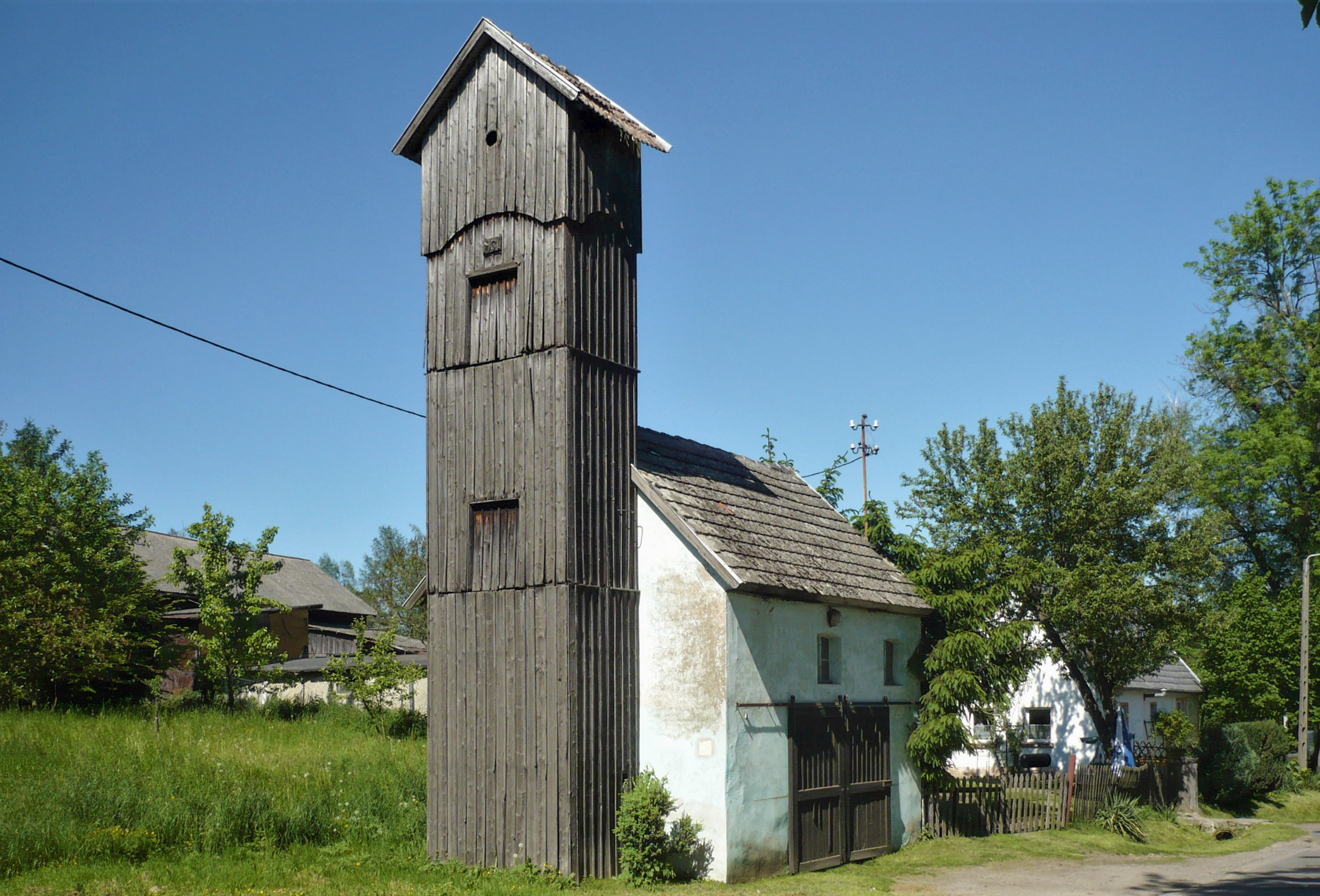 Remiza straży pożarnej w Kamieńcu